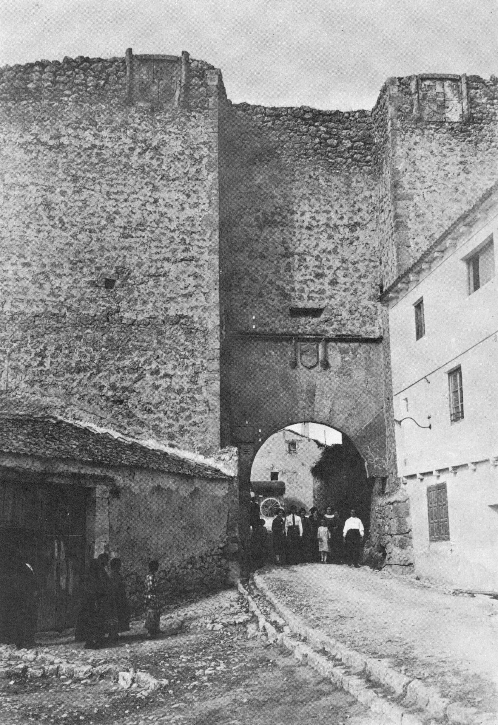 Arco de San Martín (Cuéllar) a principios del siglo XX.